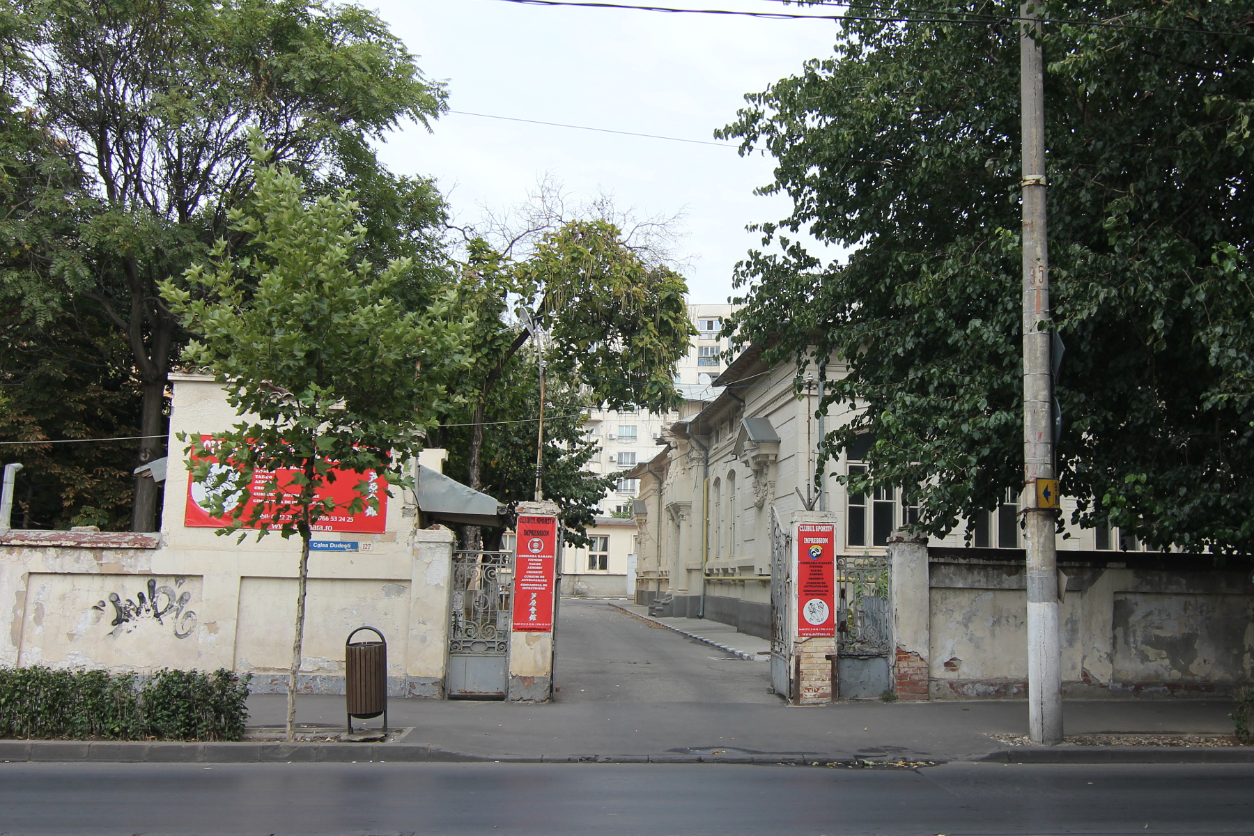 Liceul industrial "Timpuri Noi"